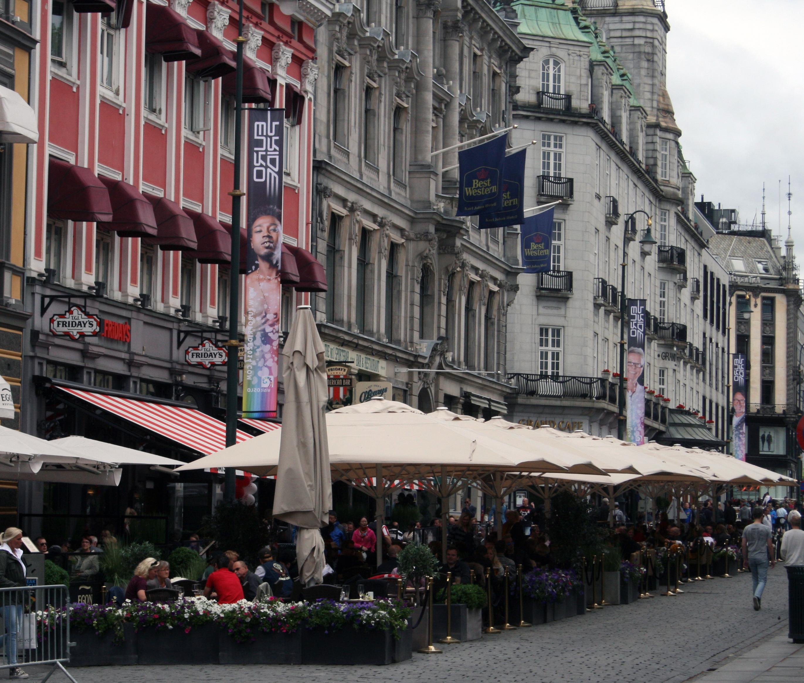 Uteservering langs Karl Johan-kvartalet sommeren 2014